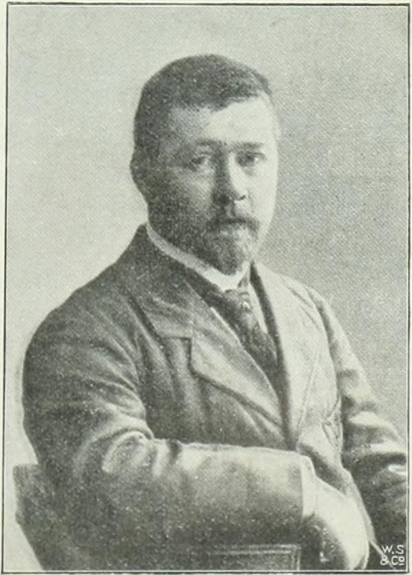 Den norske tegneren Wilhelm Wetlesen.